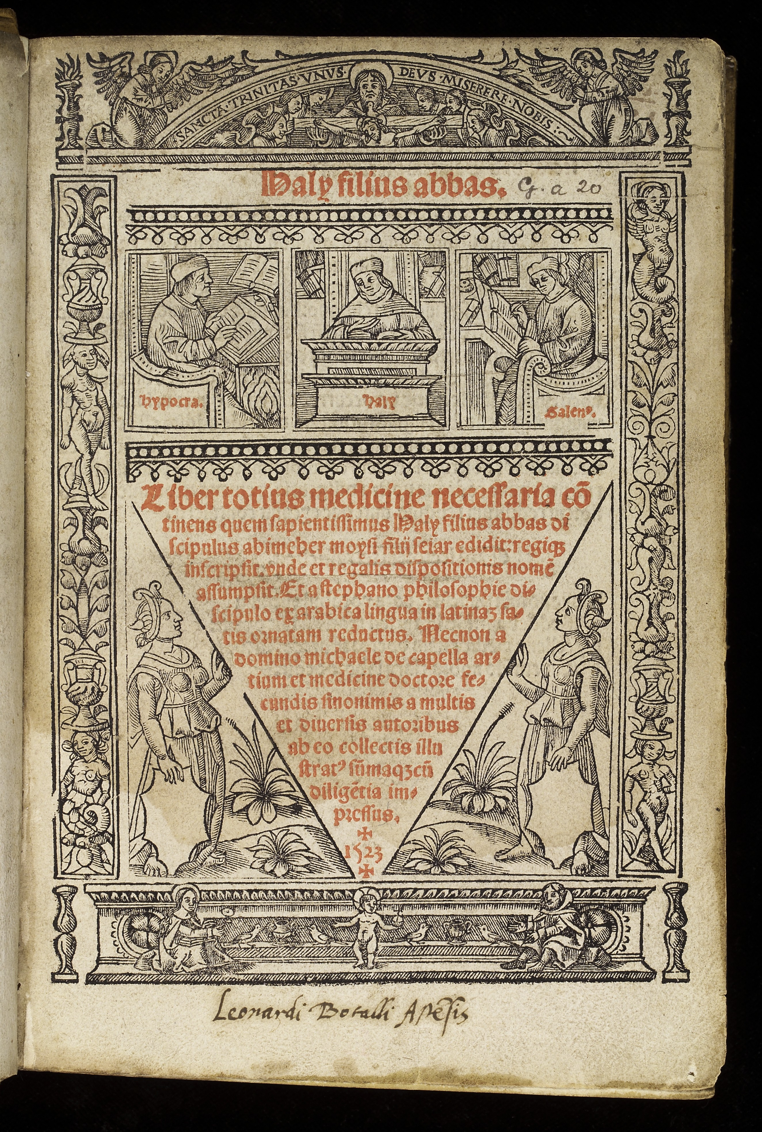 Liber totius medicine necessaria continens quem sapientissimus Haly filius abbas discipulus abimeher moysi filii seiar edidit: regique inscripsit unde et regalis dispositionis nomen assumpsit / Et a Stephano philosophie discipulo ex arabica lingua in latinum ....... reductus. Necnon a domino michaele de capella .... fecundis sinonimis a multis et diversis autoribus eb eo collectis illustratus summaque cum diligentia impressus. Wellcome Images Keywords: Books; Haly Abbas; Book; Frontispiece